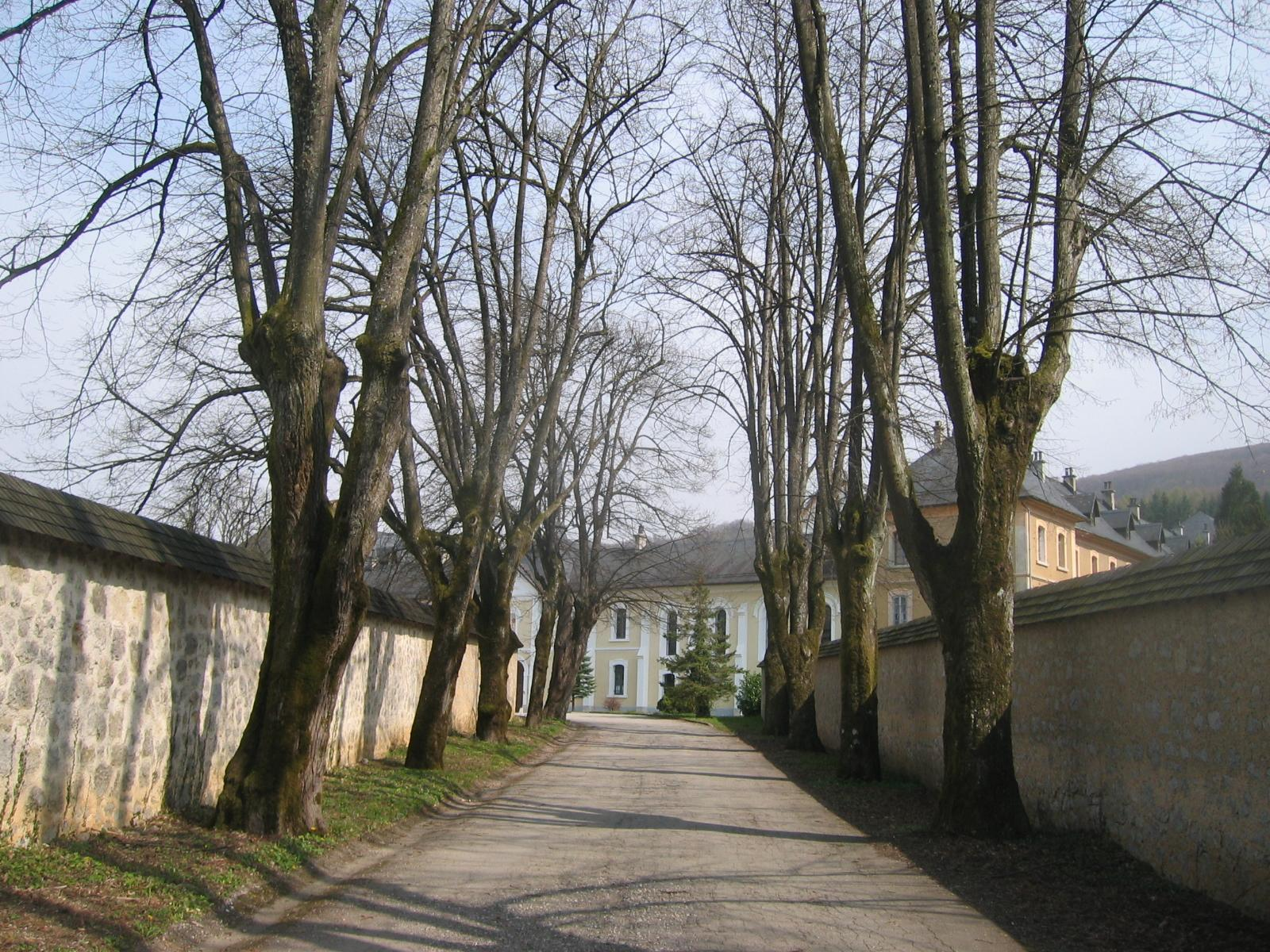 Pleterje, monastery in Slovenia photo:Ziga 08:07, 2 April 2007 (UTC)